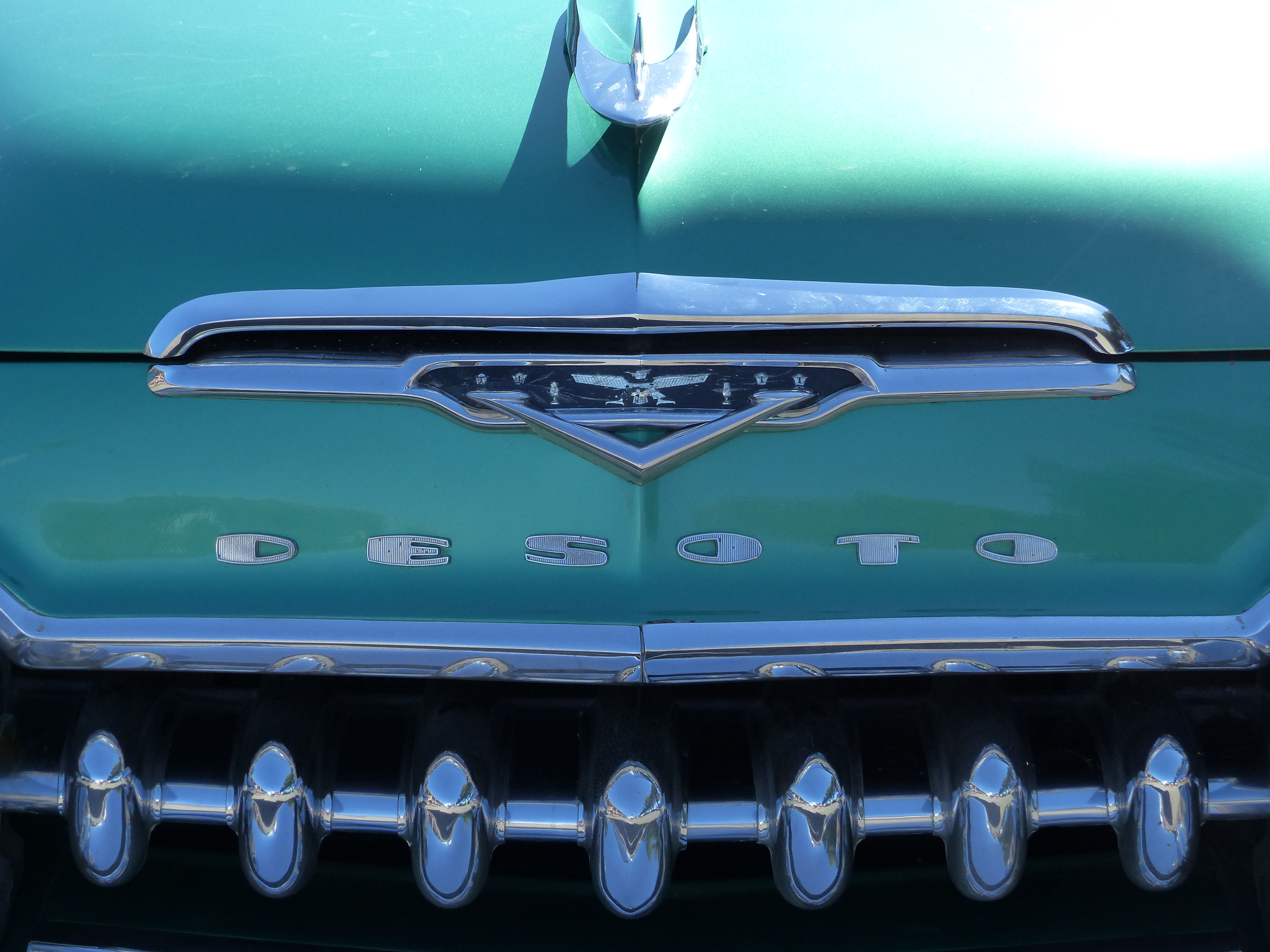 De Soto automobiles